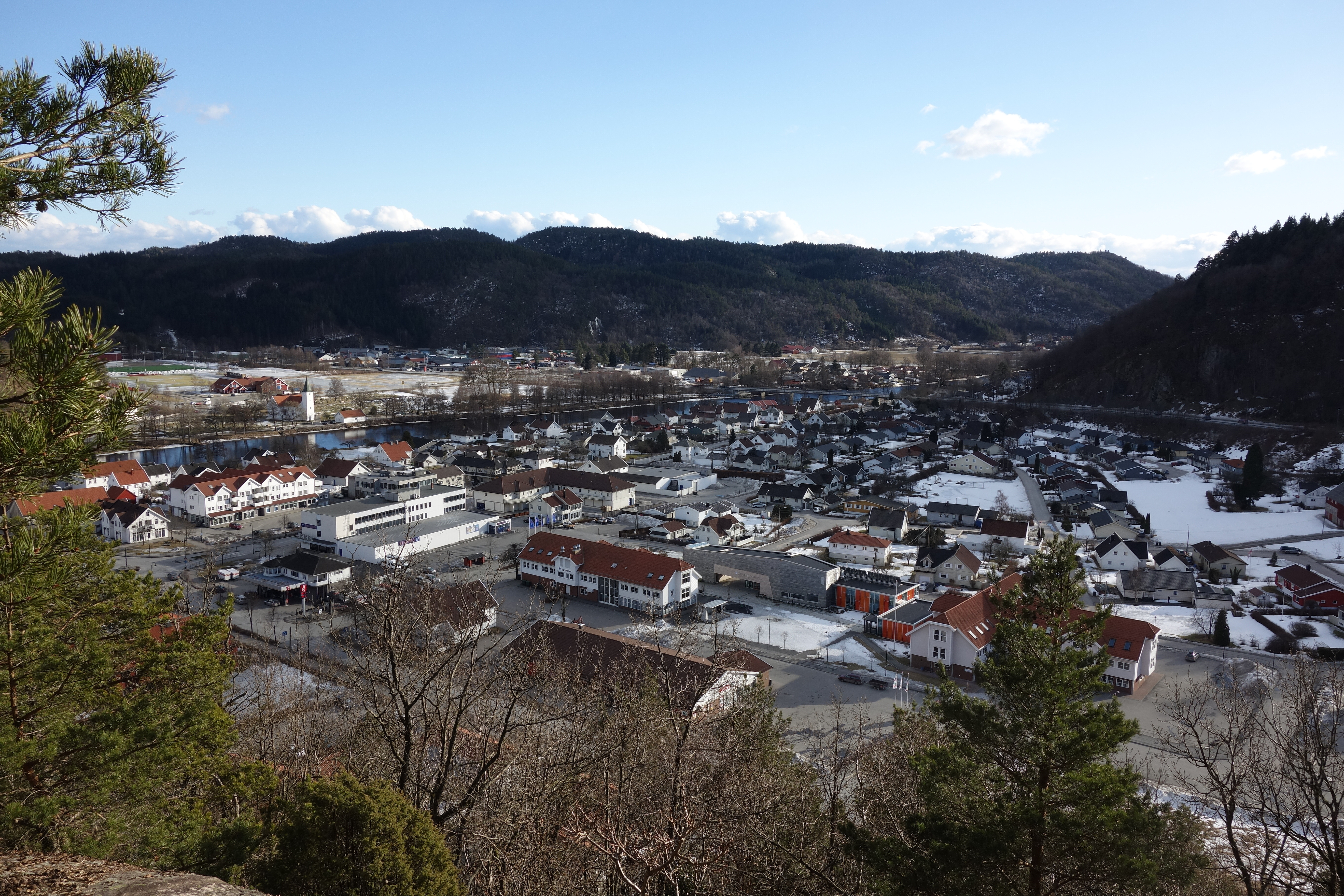 Valle kirke helt til venstre, så ser vi Audnaelva som deler kommunen i to. Nærmest til venstre sees rådhuset og Kulturtorvet.